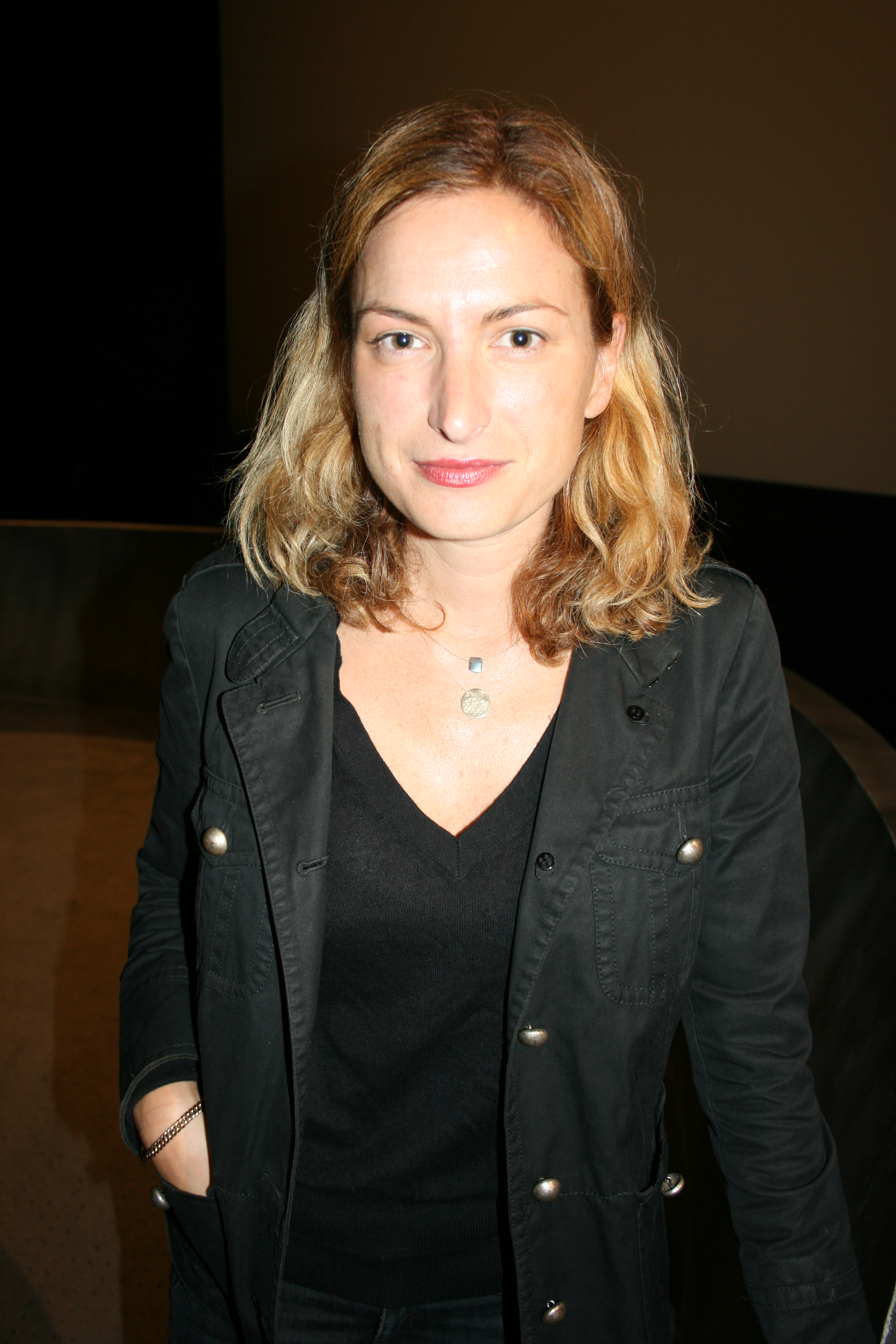 Zoe Cassavetes à l'avant-première de Broken English diffusée à l'UGC Ciné Cité Les Halles, à Paris.